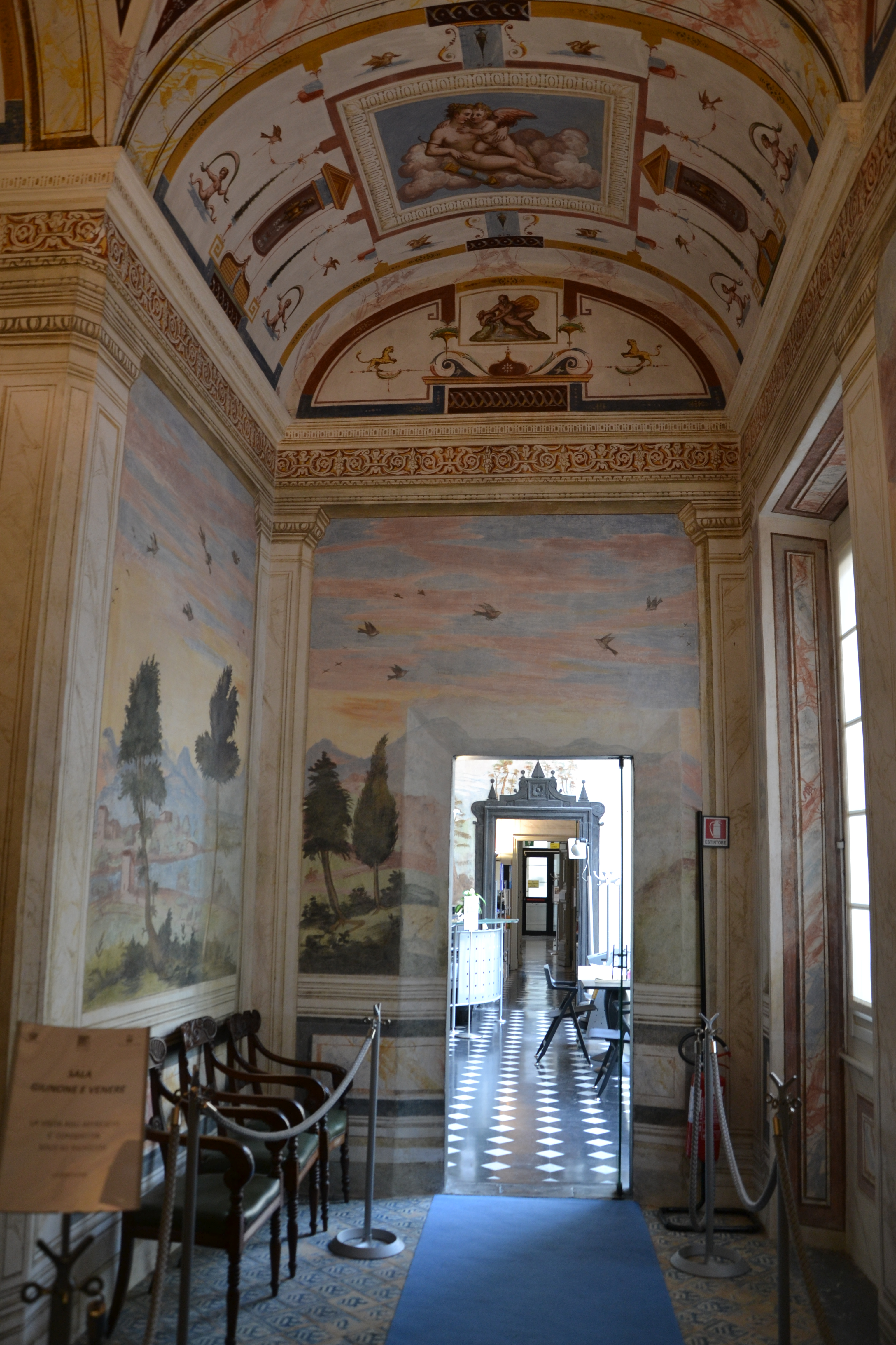 Villa Imperiale di Terralba (Genoa)